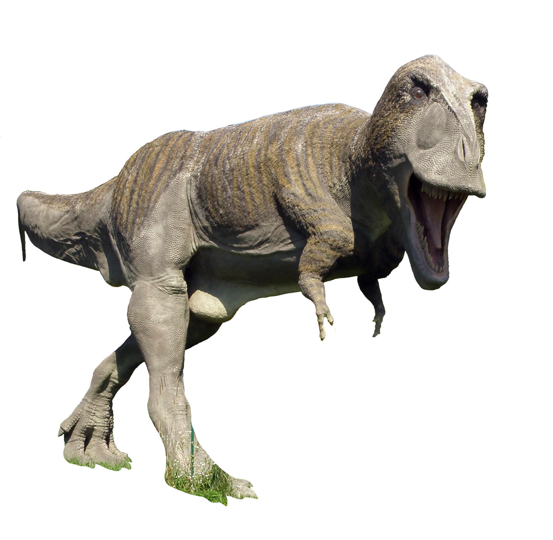 JuraPark Bałtów - Park Dinozaurów - Tyranozaur (Tyrannosaurus)